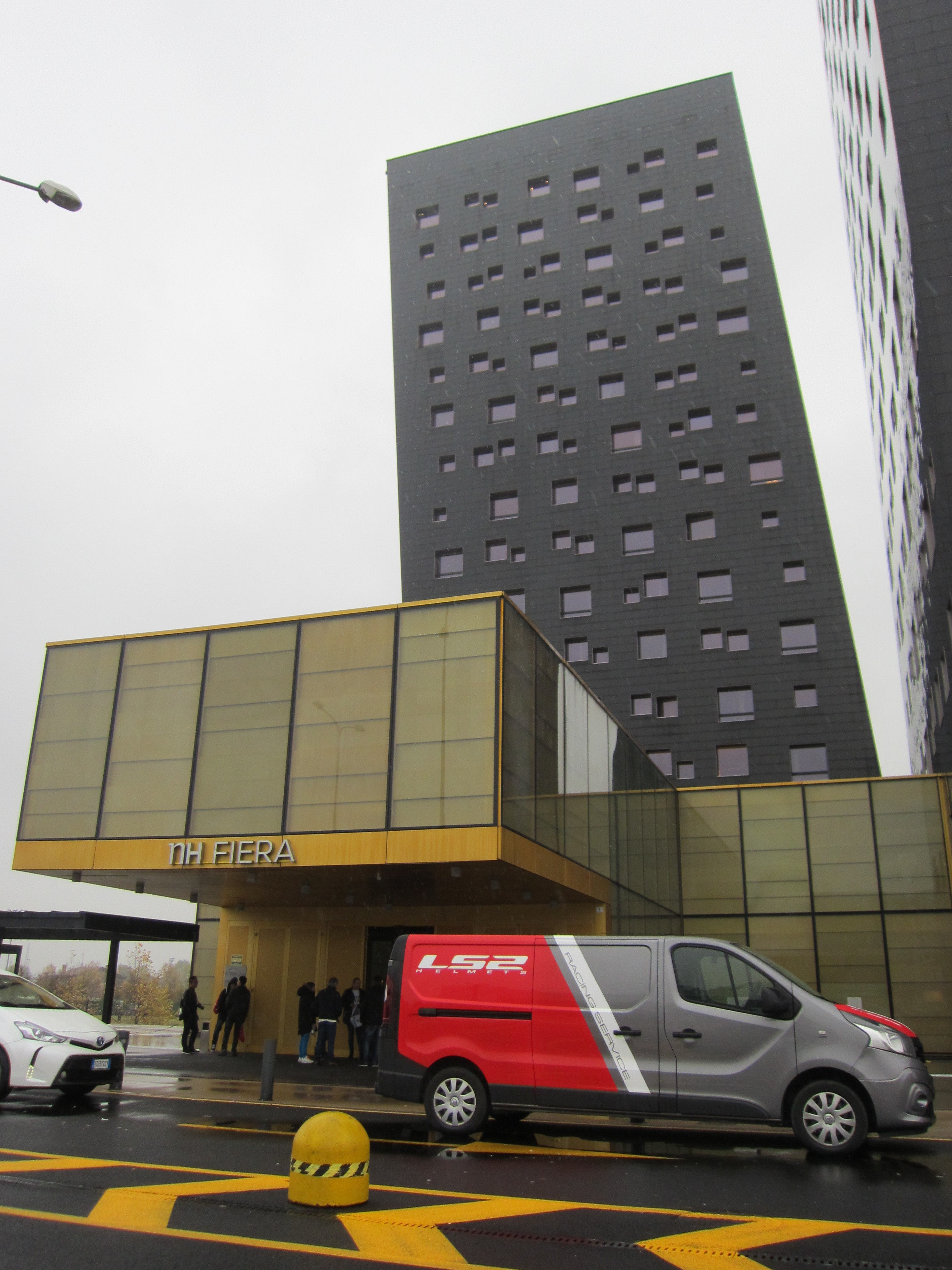 NH Hoteles Rho, Viale degli Alberghi, 20017 Rho (MI)